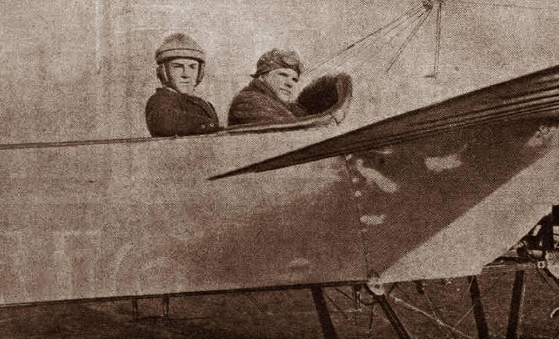 Славороссов в кабине аэроплана. 1913.